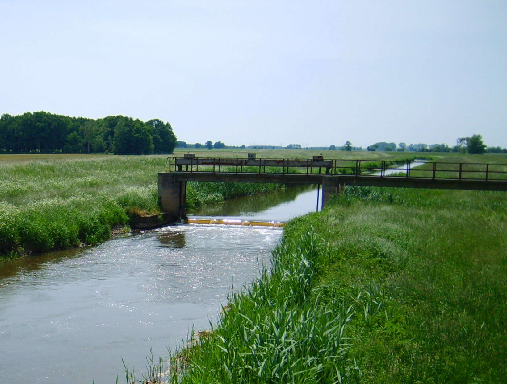 Die Große Röder bei Würdenhain.